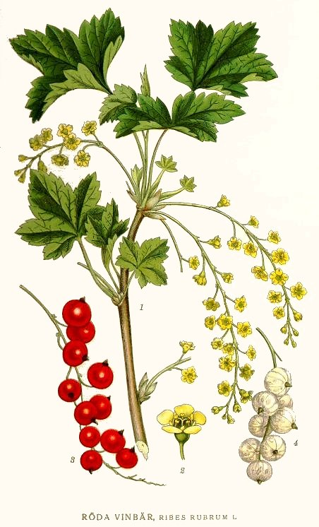 Original Description Röda vinbär, Ribes rubrum L.